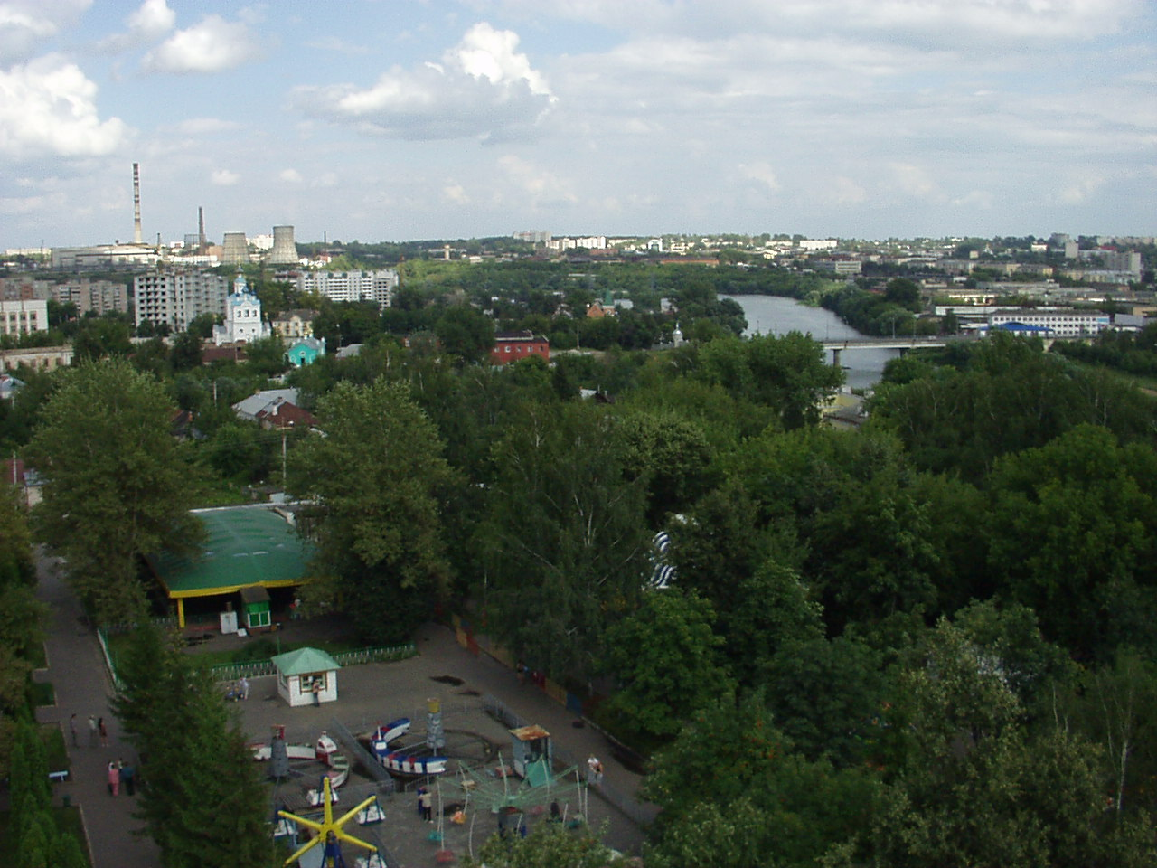 View of Oryol city from Ferris wheel / Вид города Орла с колеса обозрения